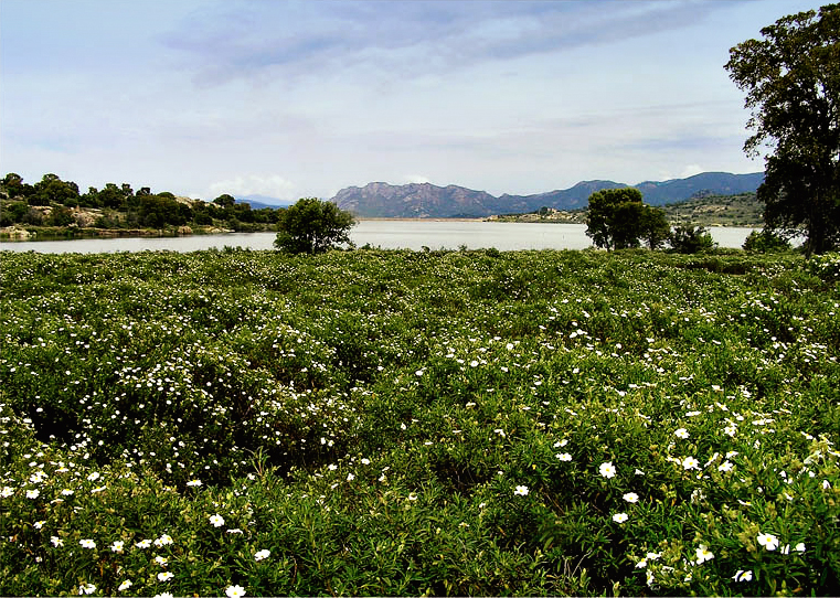 Feliceto (Corsica) - Barrage de Codole